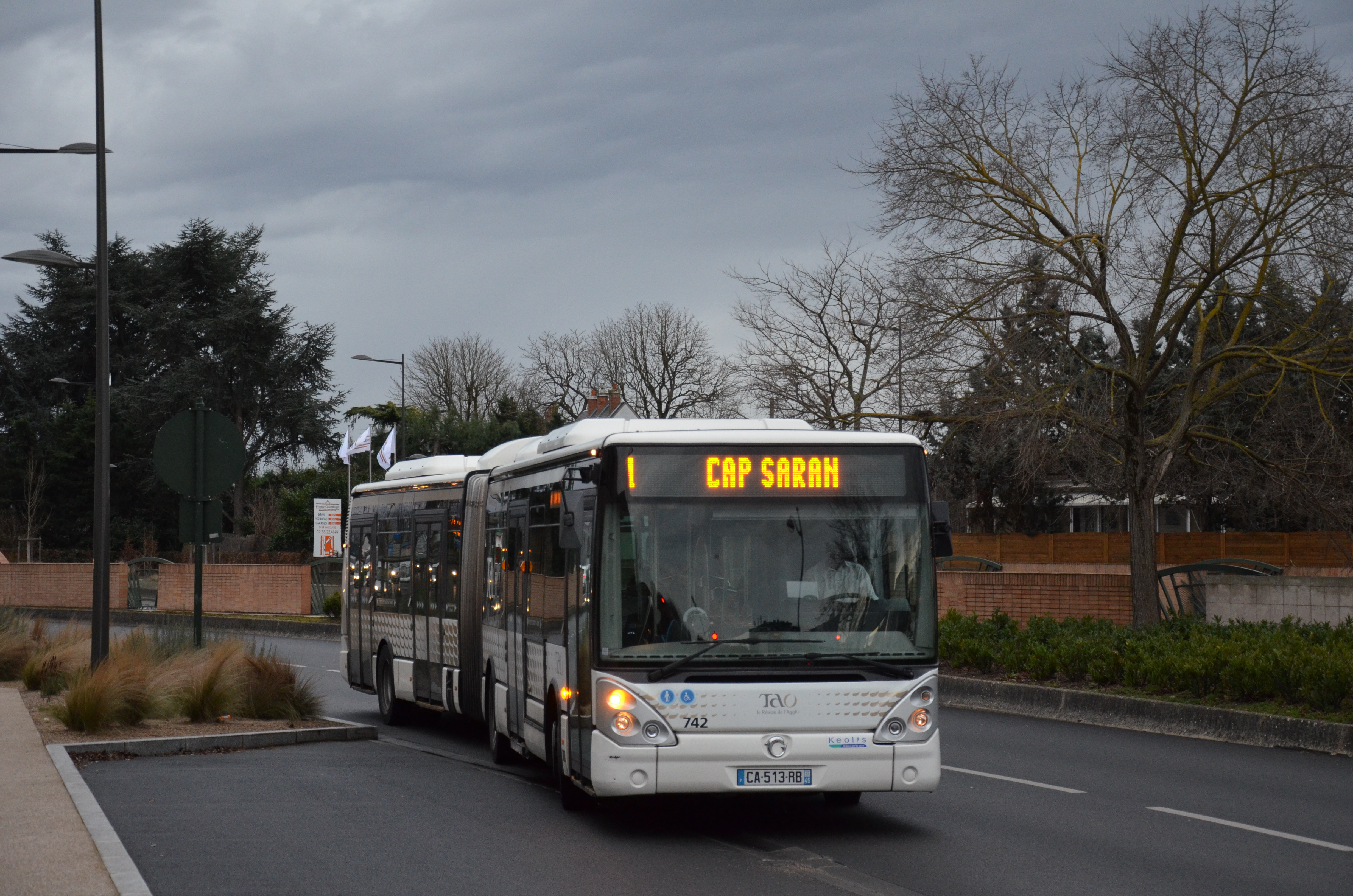 Irisbus Citelis 18 n°742 sur la ligne 1 du réseau TAO d'Orléans en direction de Cap Saran, à l'arrêt Candolle.